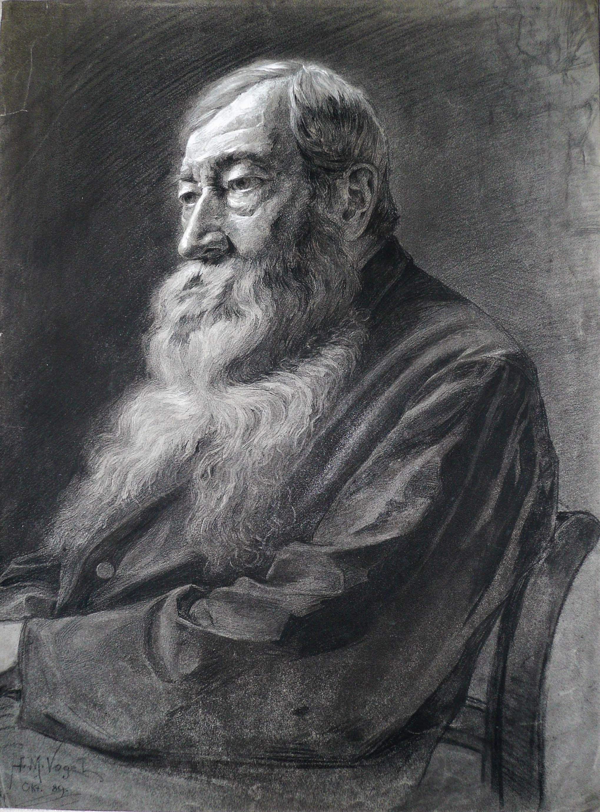 Bild eines alten Mannes, gemalt 1889, Max Vogel